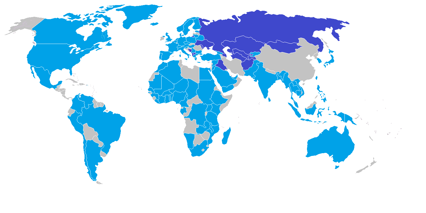 Международната олимпиада по турски - в тъмносиньо - държавите от първата олимпиада, а в светлосиньо - държавите